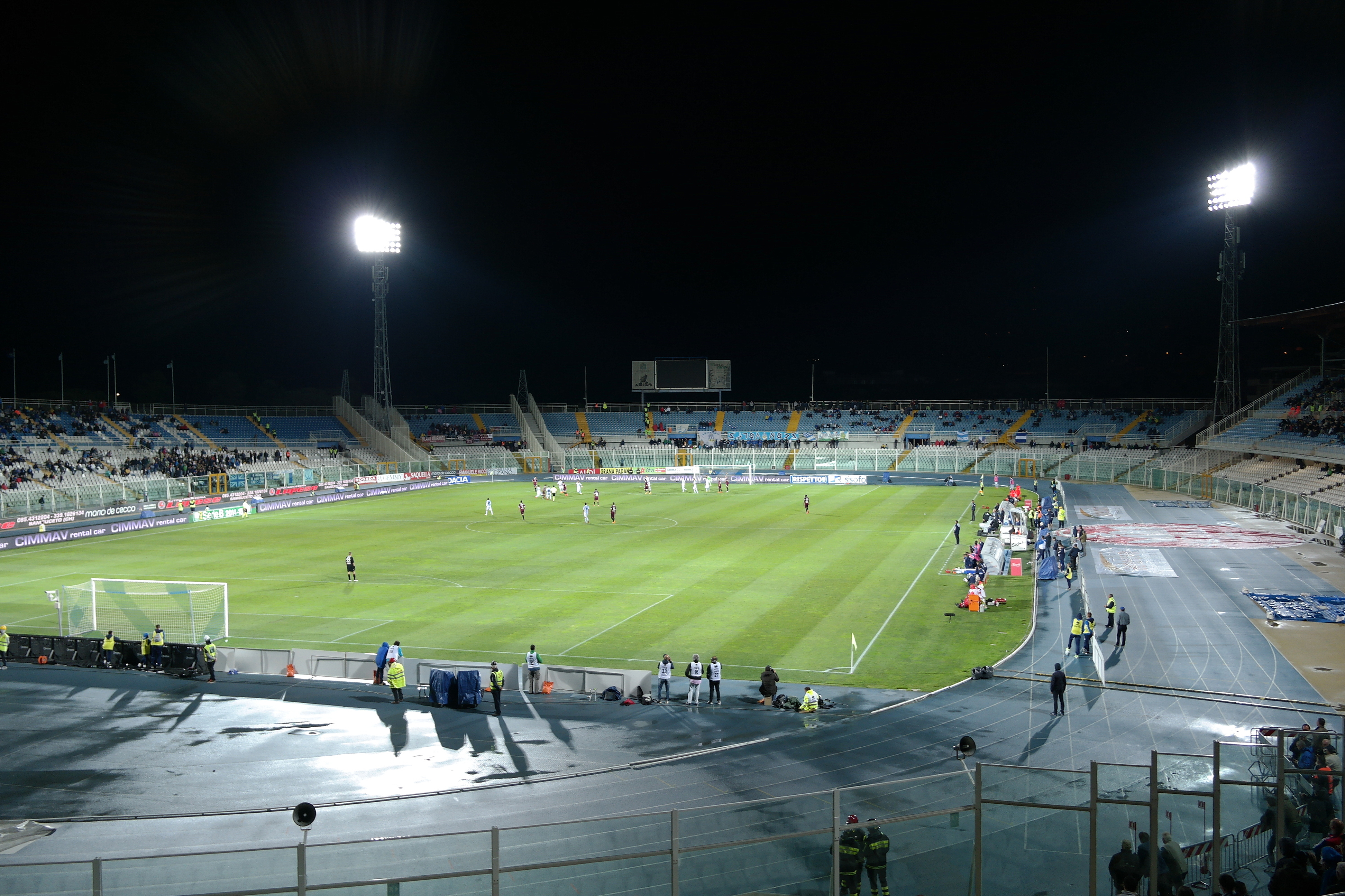 veduta dello Stadio Adriatico di Pescara